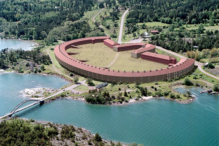 Компьютерная модель крепости Бомарсунд